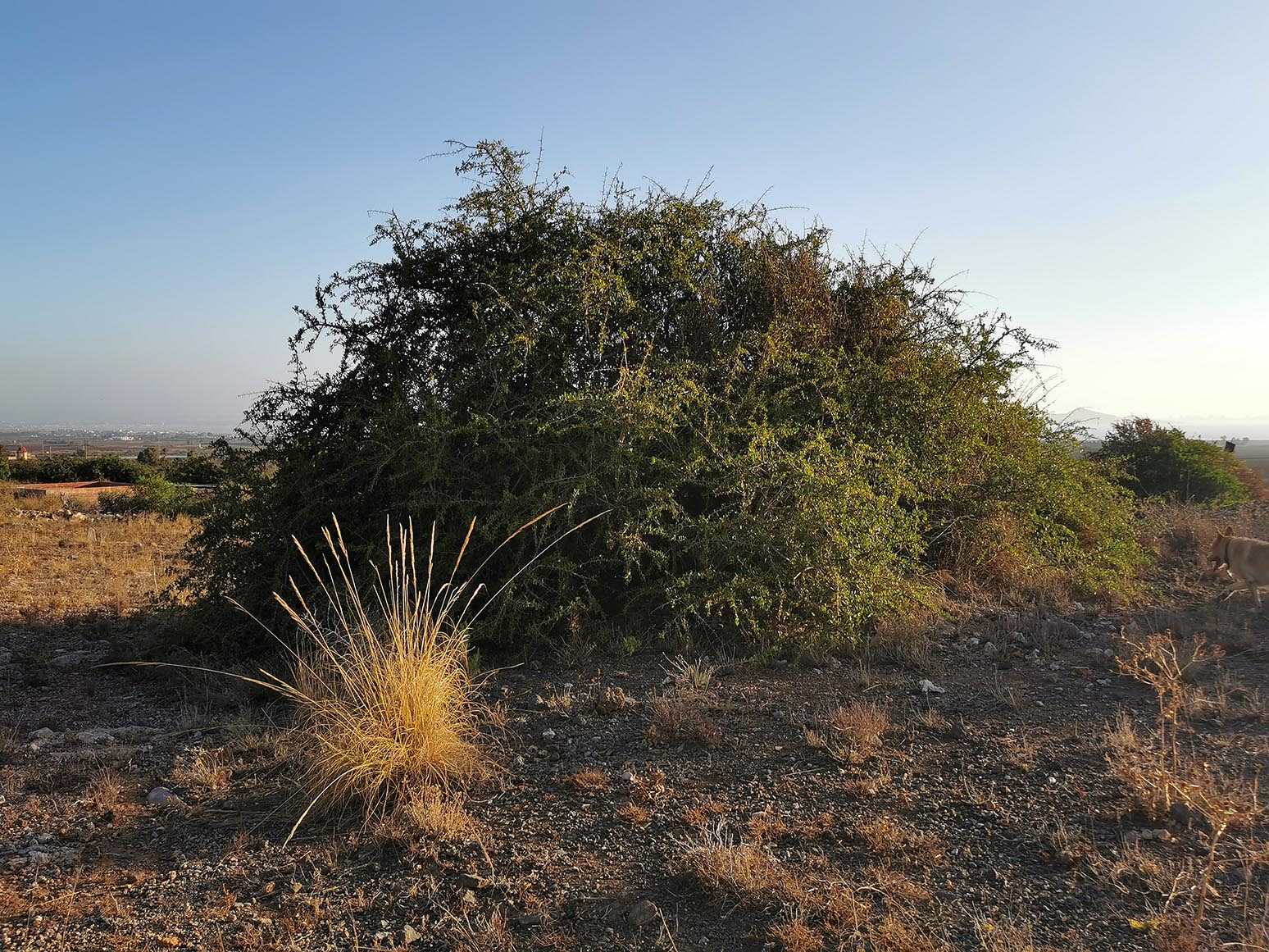 Arto (Maytenus senegalensis), especie iberoafricana en el Cabezo de San Ginés, dentro de los espacios protegidos del Mar Menor, Cartagena (España).